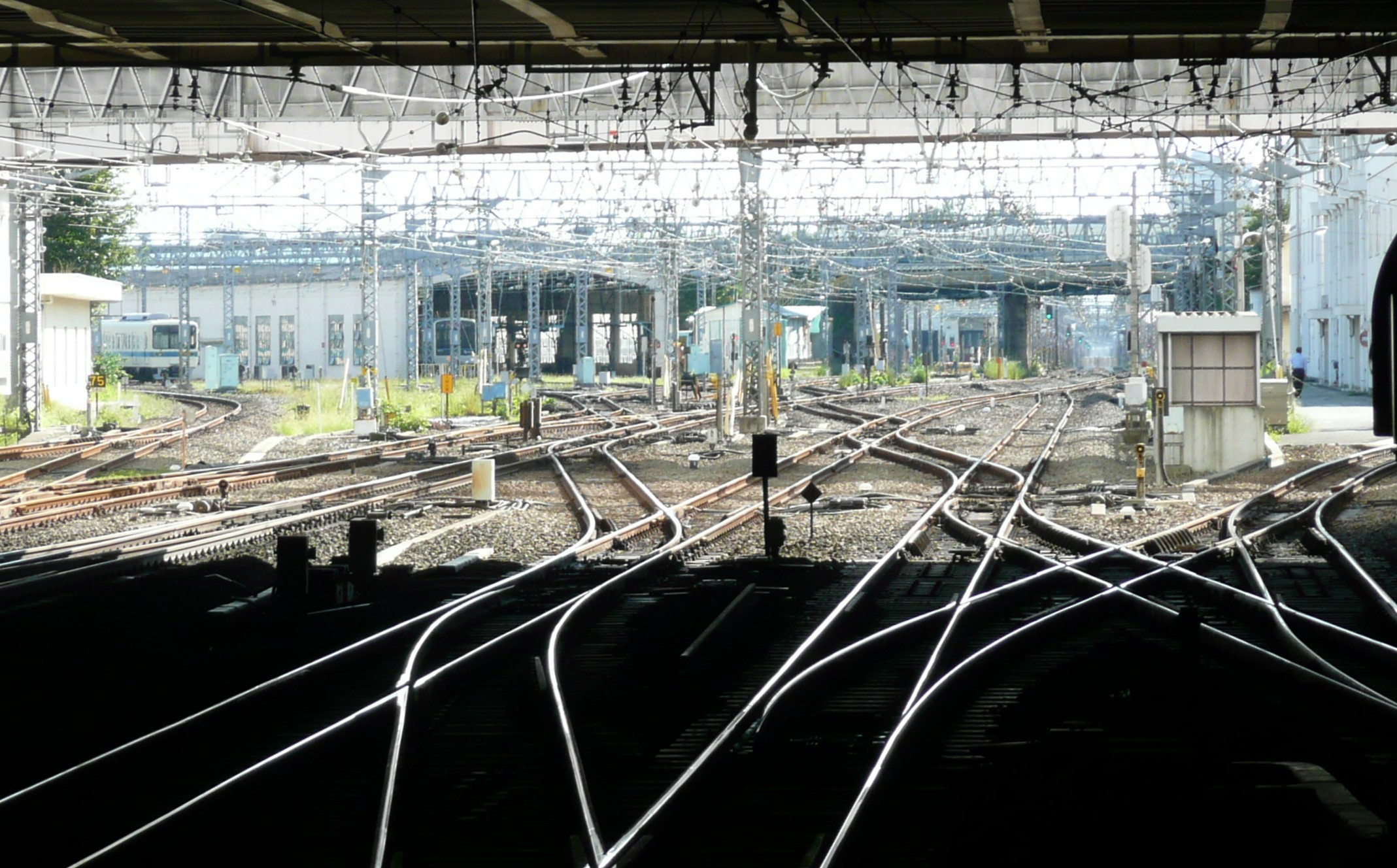 相模大野分岐点付近。相模大野駅ホーム端から撮影。